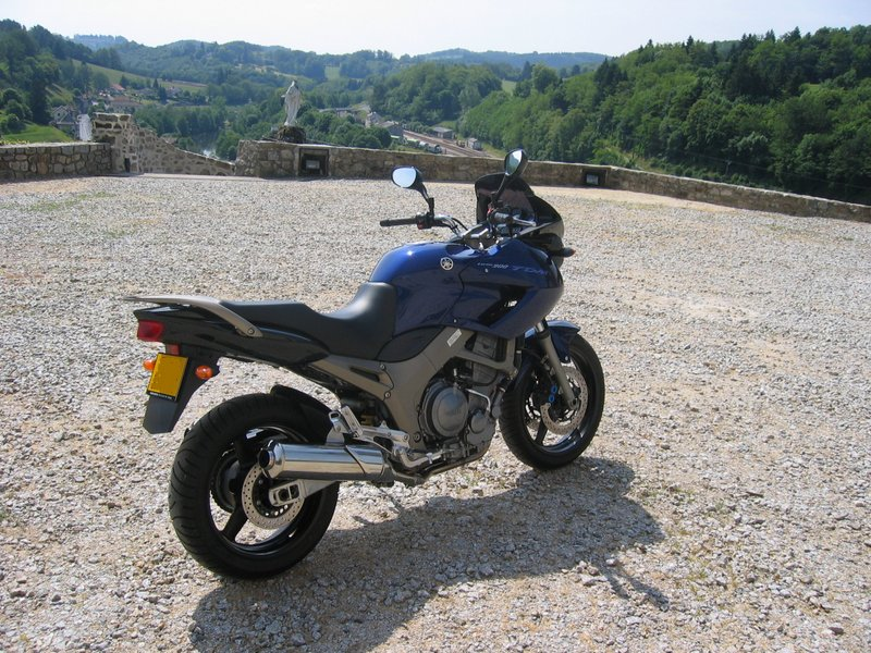 Yamaha_tdm_900_coté.jpg